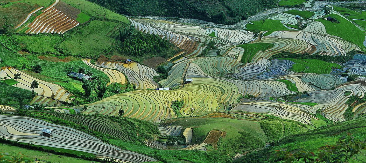 BỨC HỌA ĐỒNG QUÊ